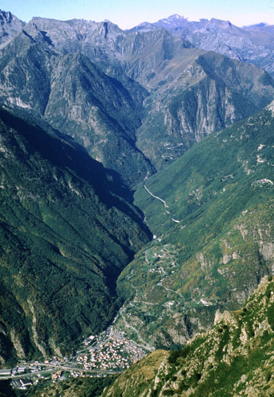 Le tre gòye di Hône, Valle d'Aosta. Hône ed il tratto terminale della valle dell’Ayasse. Le “Tre goye” sono all’apice del conoide su cui sorge il capoluogo; verso il centro della foto c’è Charvaz e Courtil è verso destra